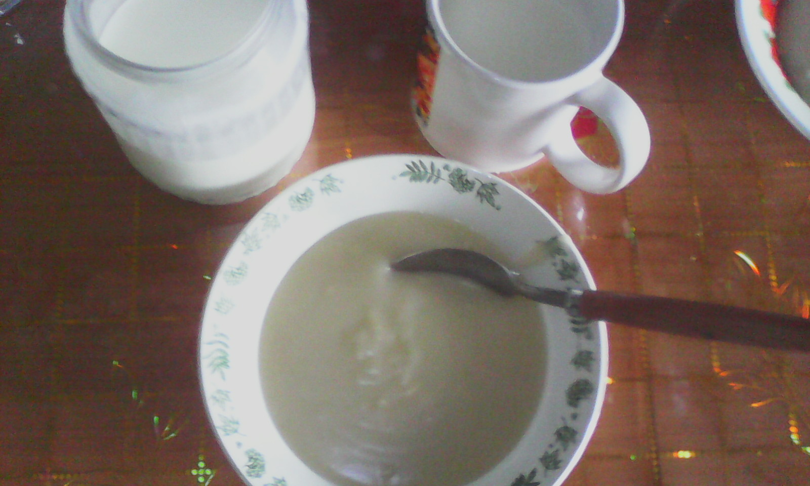 Слово "кисель" произошло от старославянского "кысль", "кысель", что означает кислый, квашеный - овсяного киселя (несладкое, кисловатое студенистое блюдо). Современные сладкие фруктово-ягодные кисели на крахмале имеют только общее название с ним и являются десертом. Кисель в горячем виде разливают в тарелки.